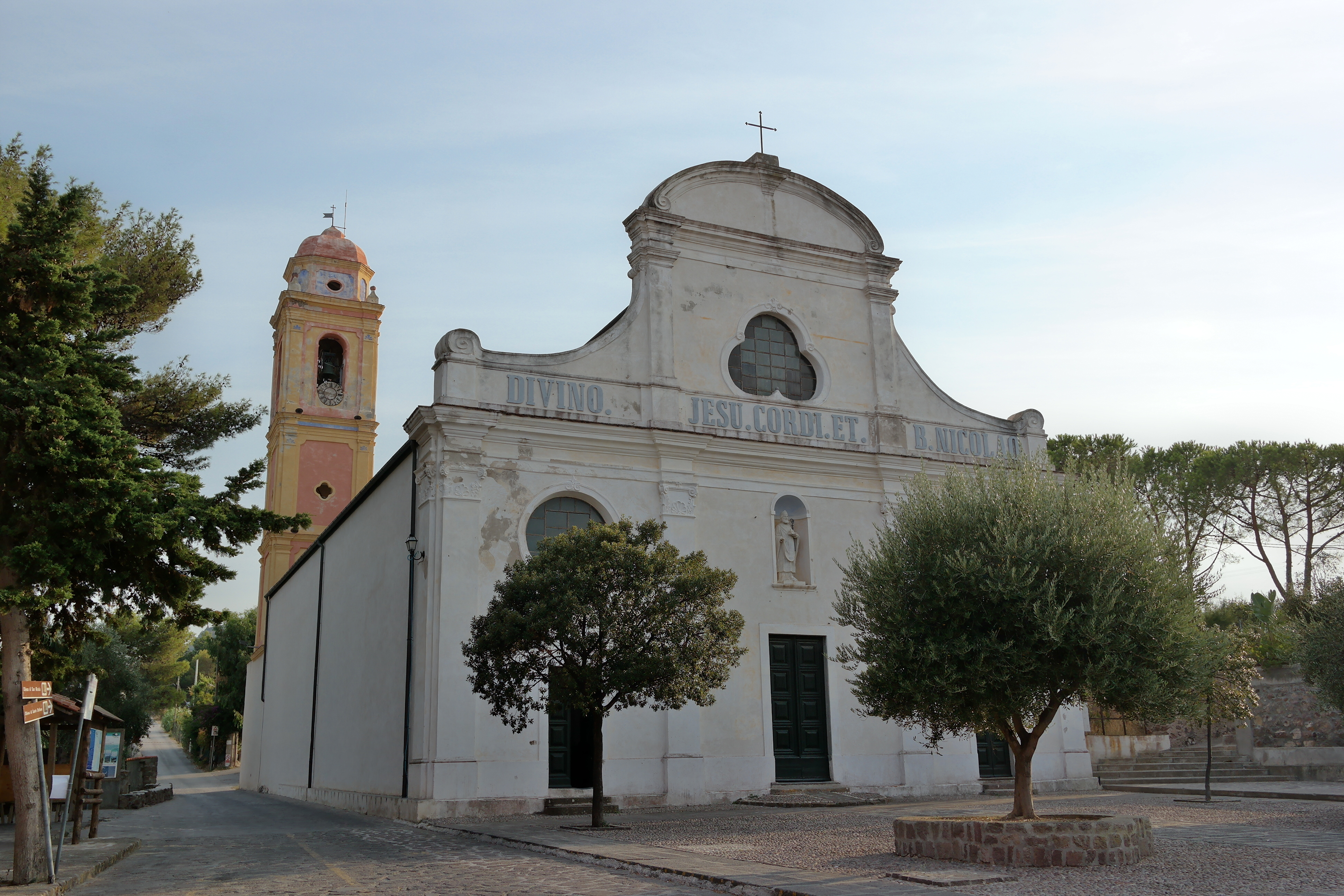 Chiesa di San Nicola, sull'isola di Capraia